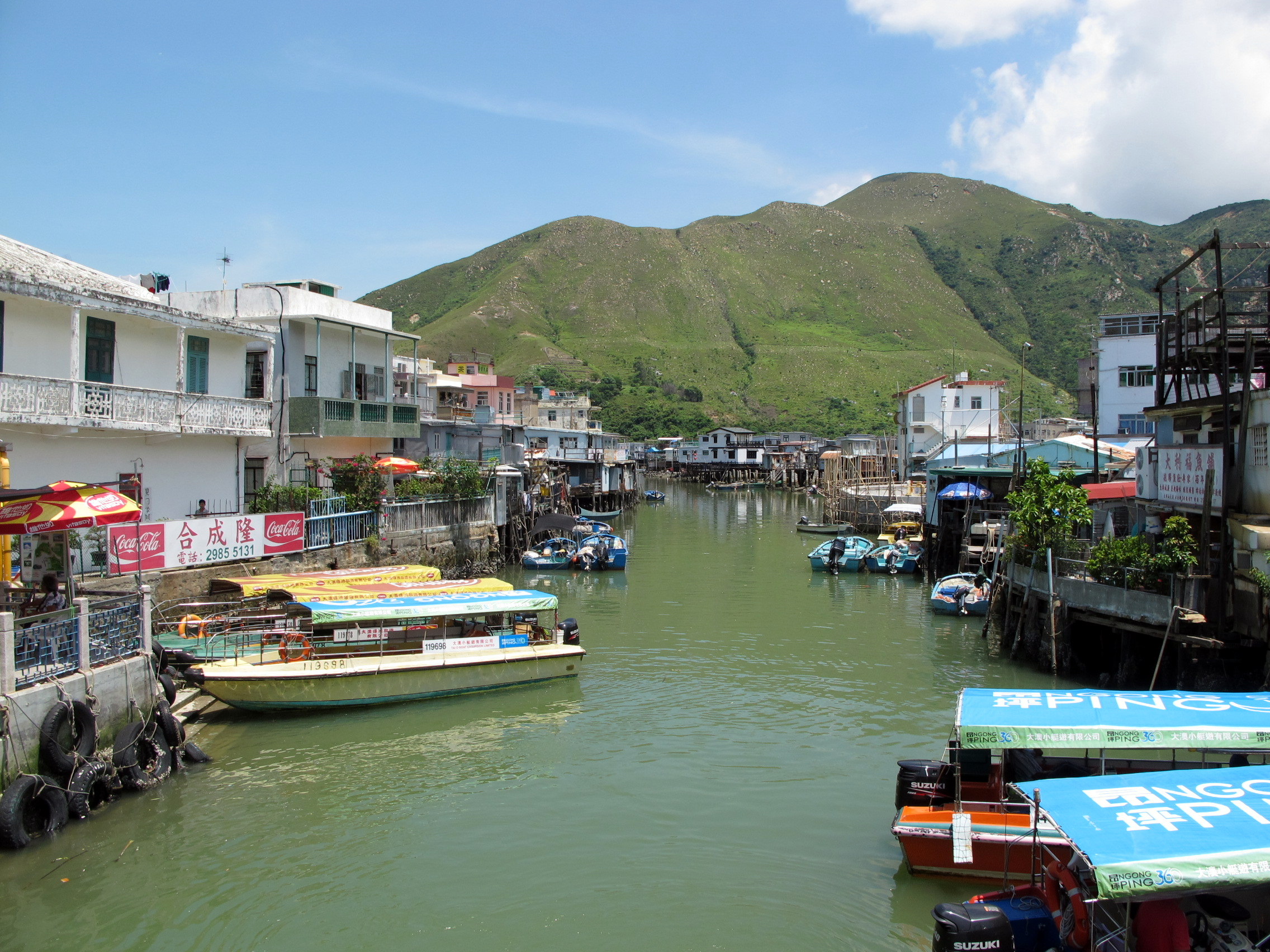 Tai O